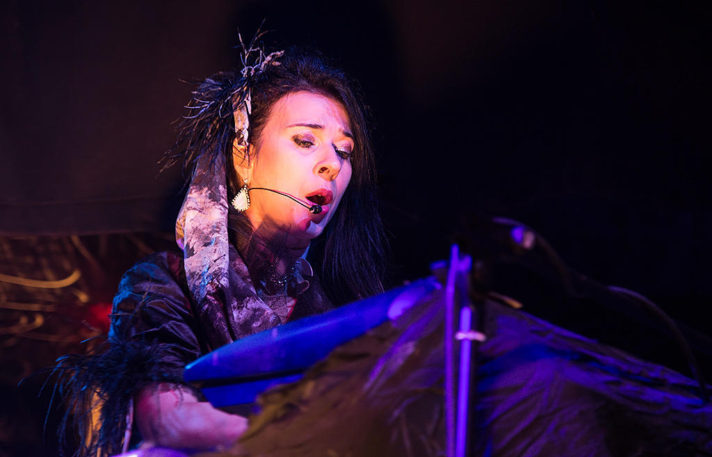 Lacrimosa